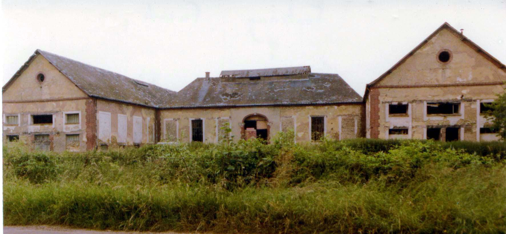 Photo d'une ancienne Sucrerie Française Fontenay en vexin (Eure)